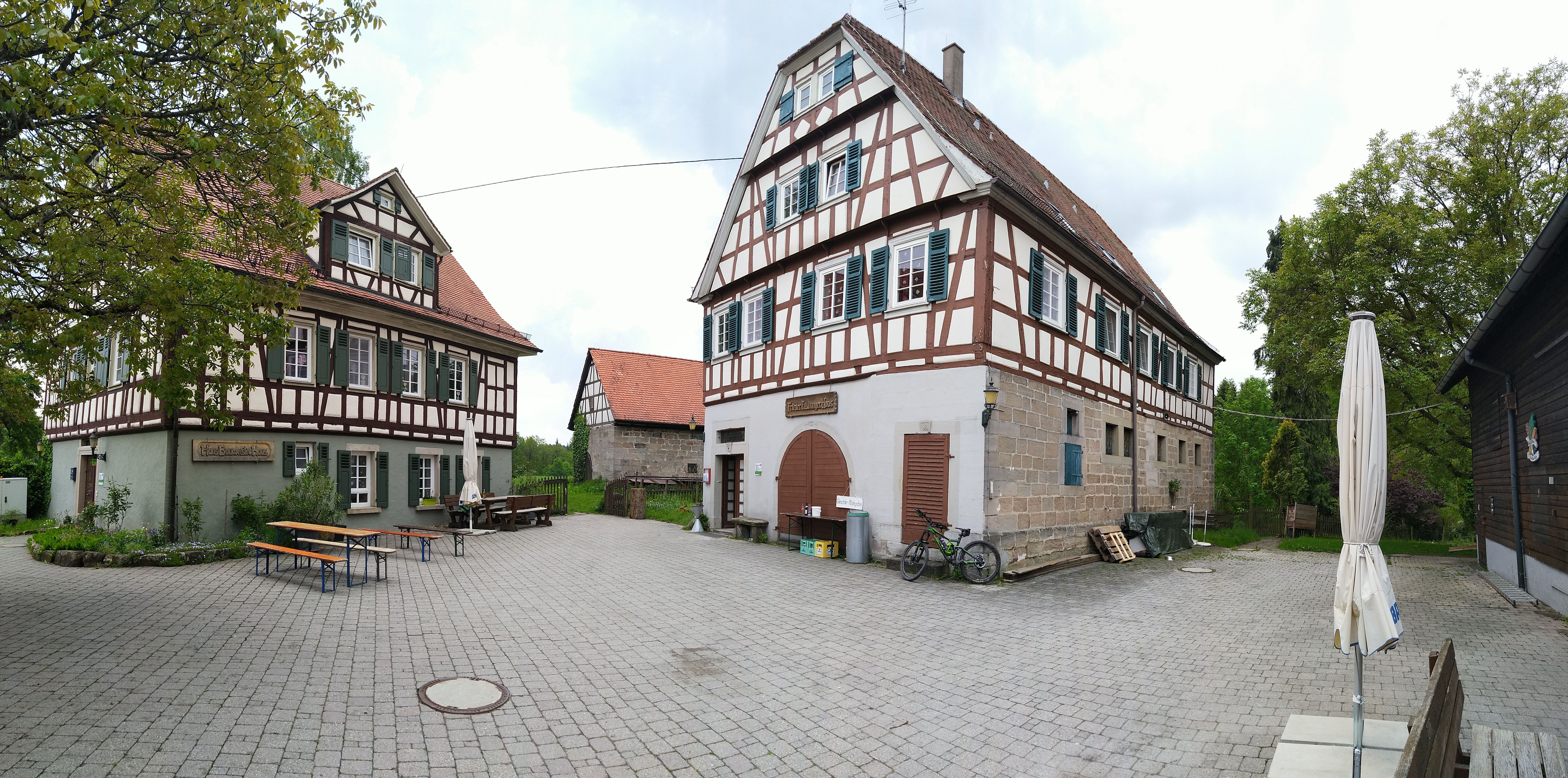 Wanderheim Eschelhof, Bereich des Innenhofes